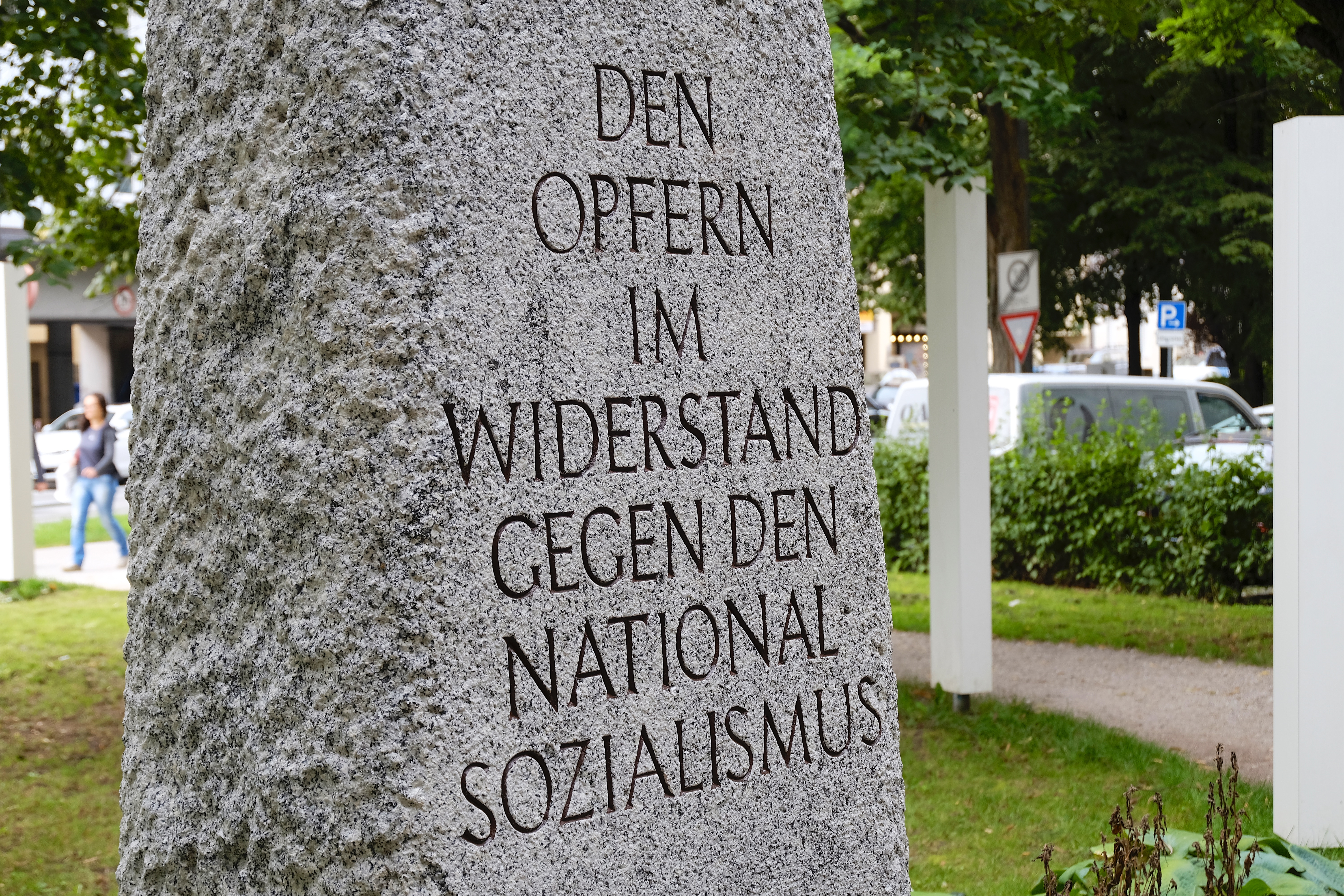 Inschrift Denkmal Platz der Freiheit, München